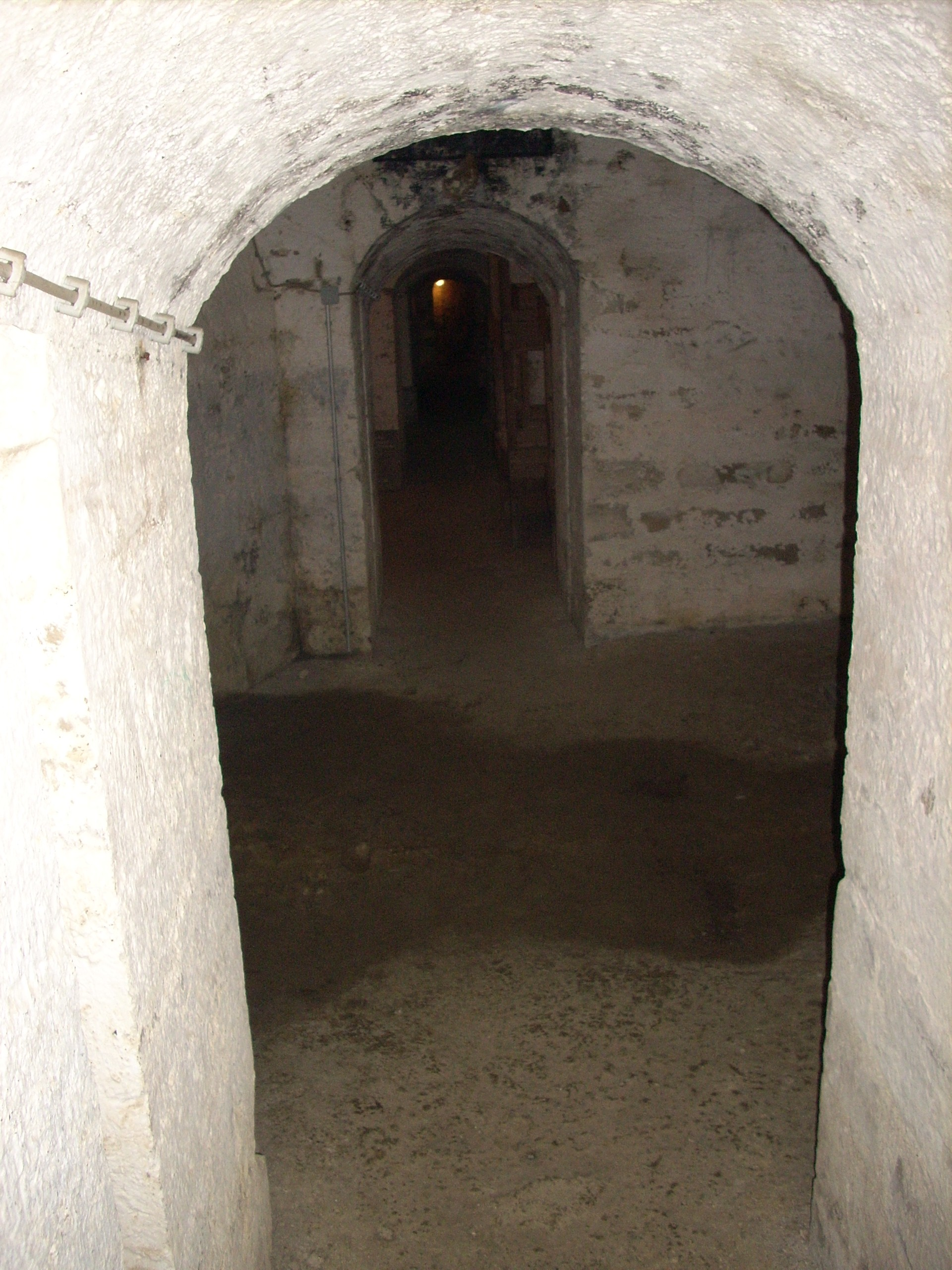 Fort Oberer Kuhberg (ehemaliges KZ) bei Ulm